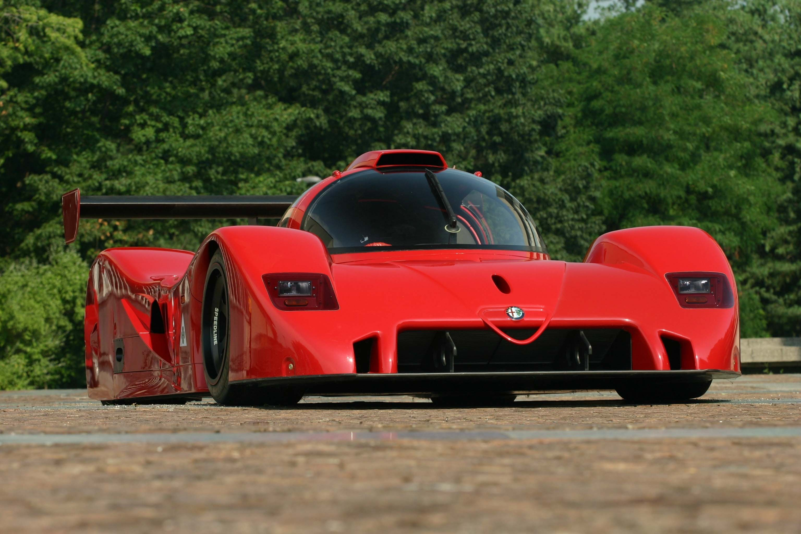 Alfa Romeo SE048 ritratta ad Arese (Milano)